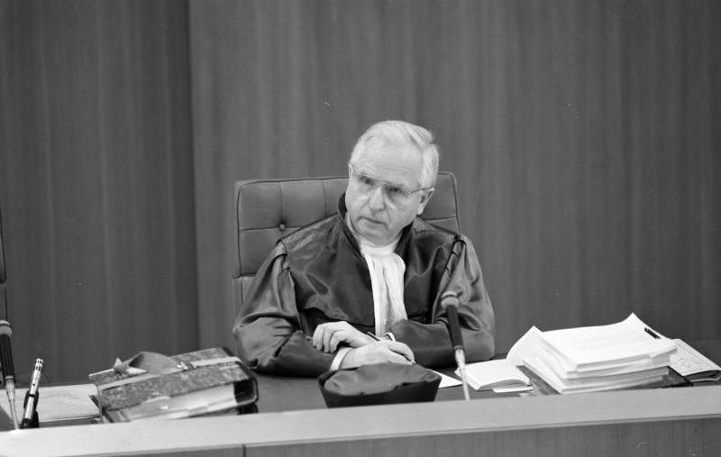 Am 17.1.1989 verhandelte der II. Senat des Bundesverfassungsgerichtes über die Verfassungmäßigkeit des Bundeshaushaltsgesetztes für 1981. Damals hatte die SPD/FDP-Koalition die Kreditermächtigung für den Haushalt um 1,9 Milliarde DM höher angesetzt als die für Investitionen vorgesehenen Ausgaben.